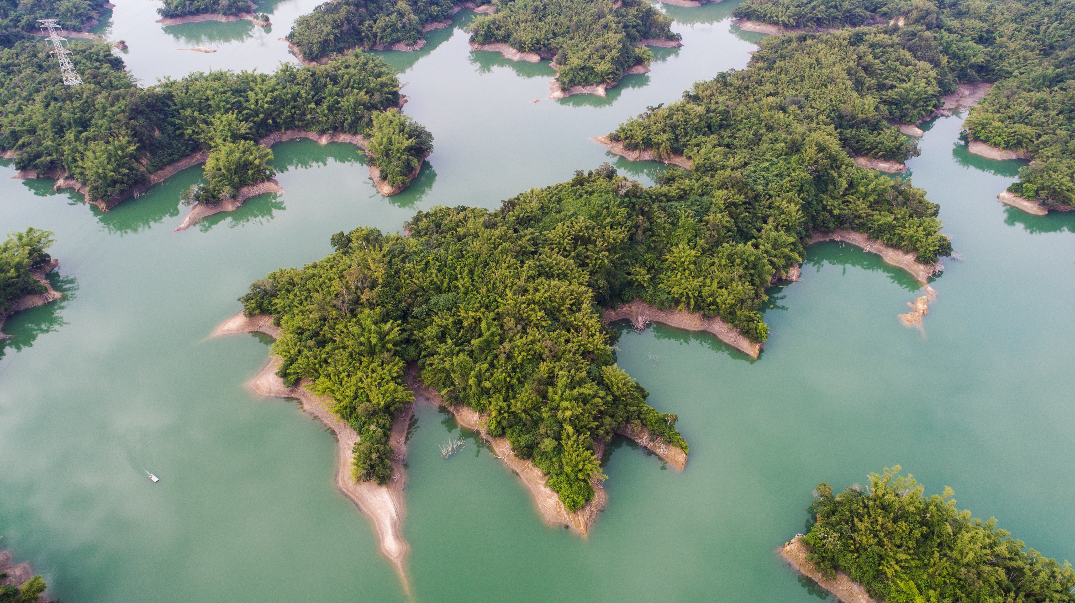 中文（台灣）: 烏山頭水庫內湖